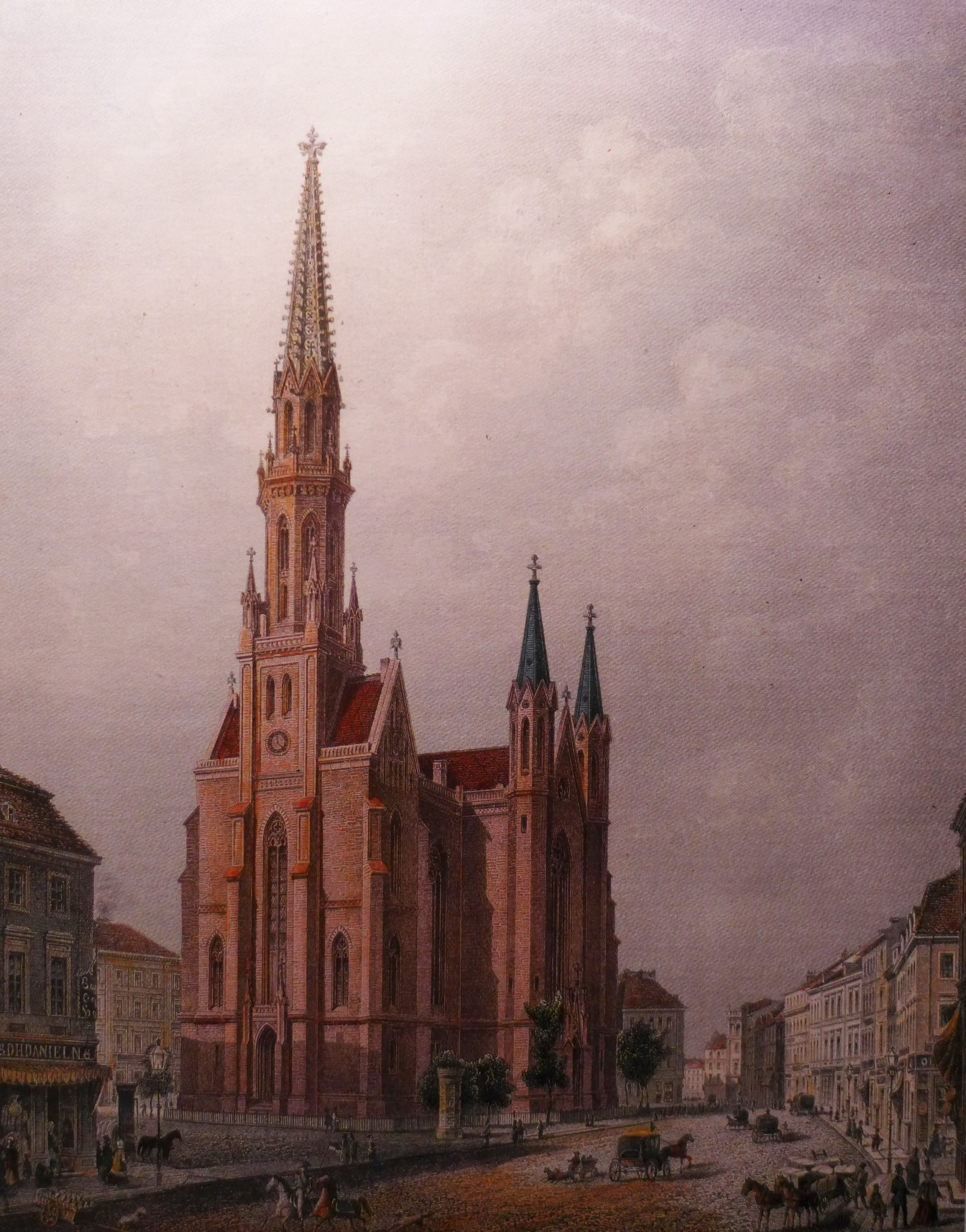 Petrikirche (Berlin), colorierter Stich, 19. Jahrhundert